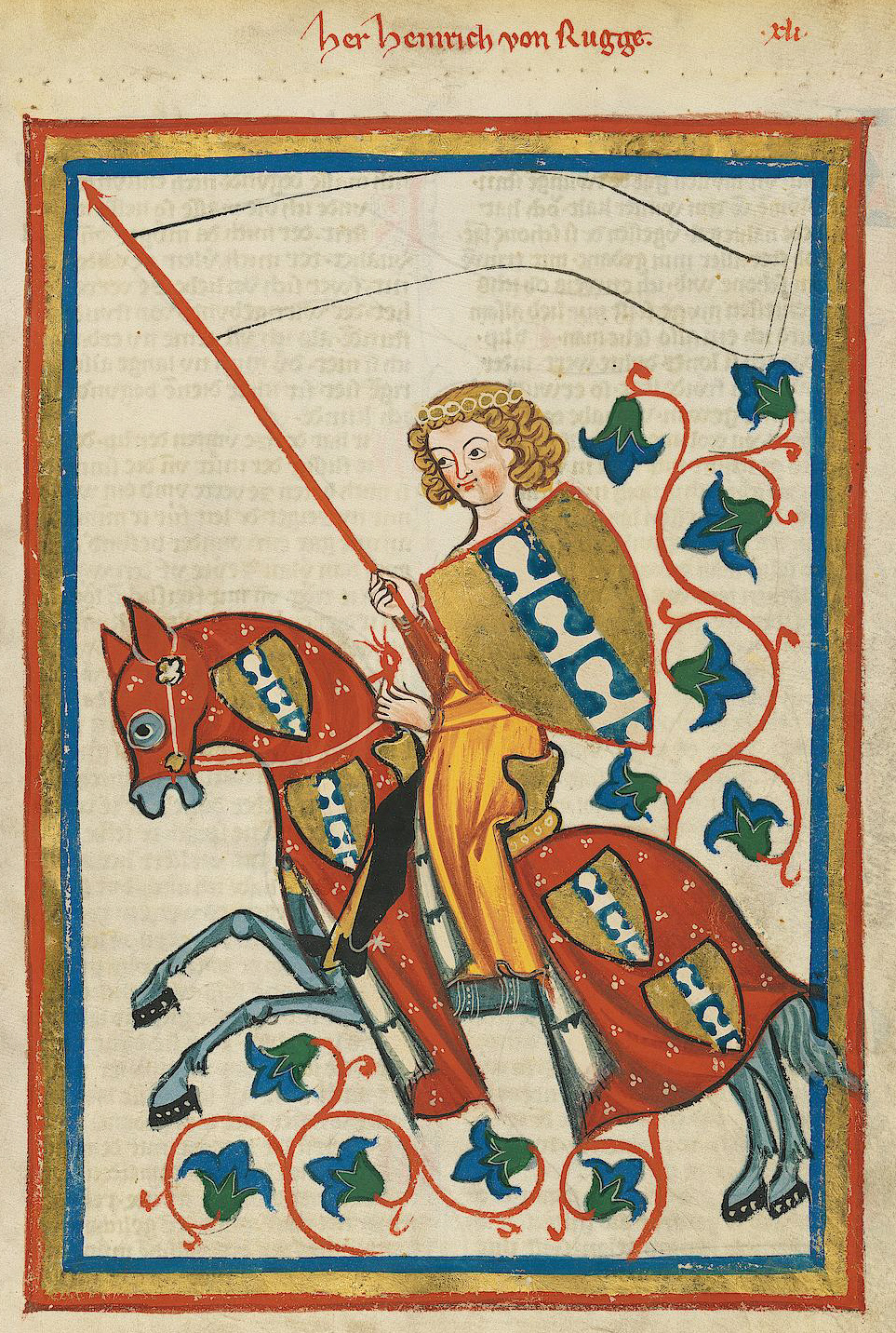 Codex Manesse, UB Heidelberg, Cod. Pal. germ. 848, fol. 122r, Herr Heinrich von Rugge